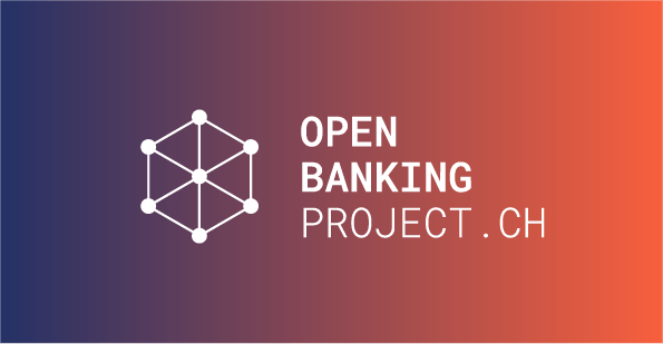 Alternatives Logo von OpenBankingProject mit Farbverlauf